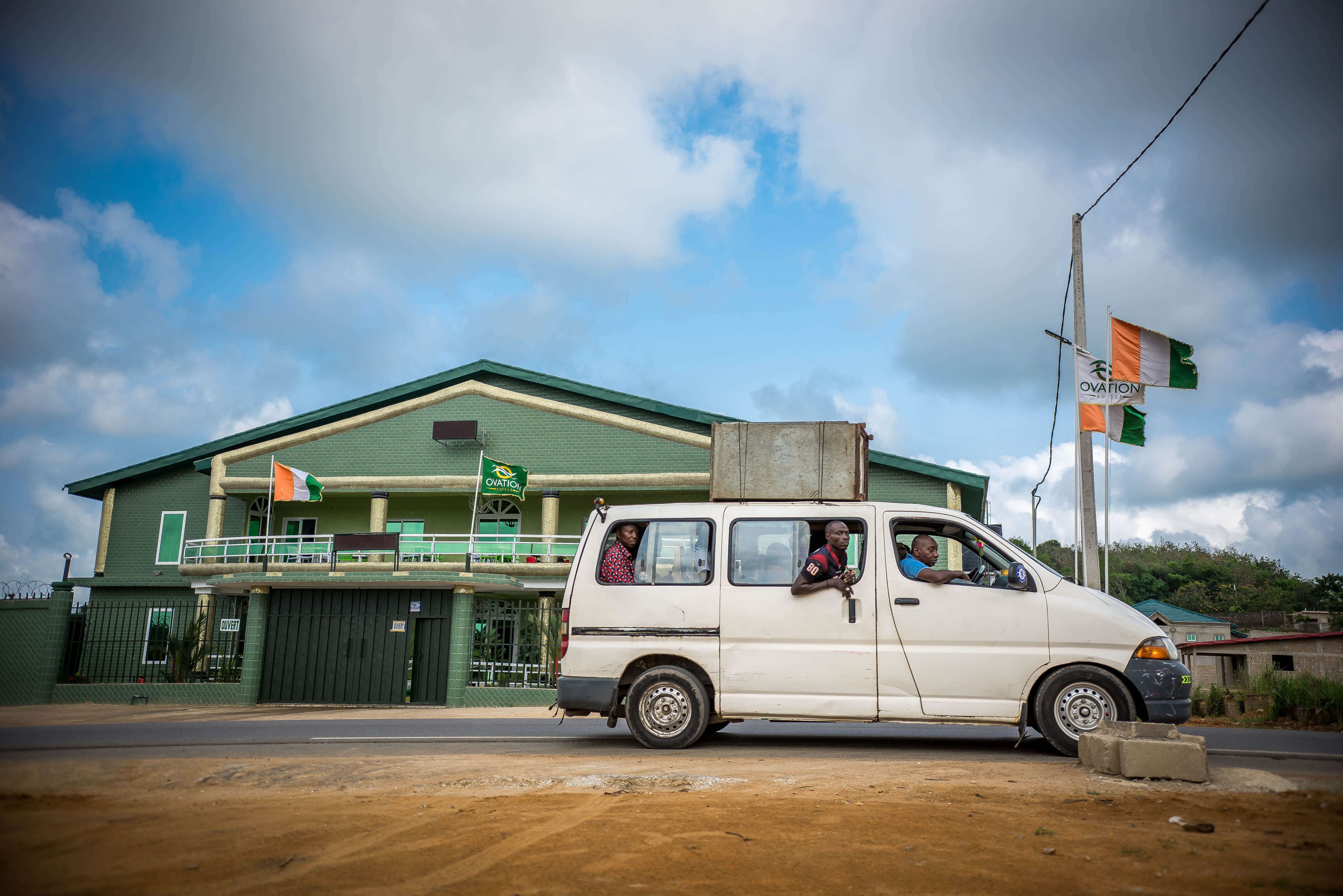 Le gbaka un mini-car de transport en commun de 18 place qui relie Abidjan à Bonoua This is an image with the theme "Africa on the Move or Transport" from: Ivory Coast